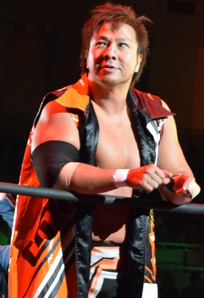 2015年9月27日 ワールド記念ホール「DESTRUCTION in KOBE」 小島聡